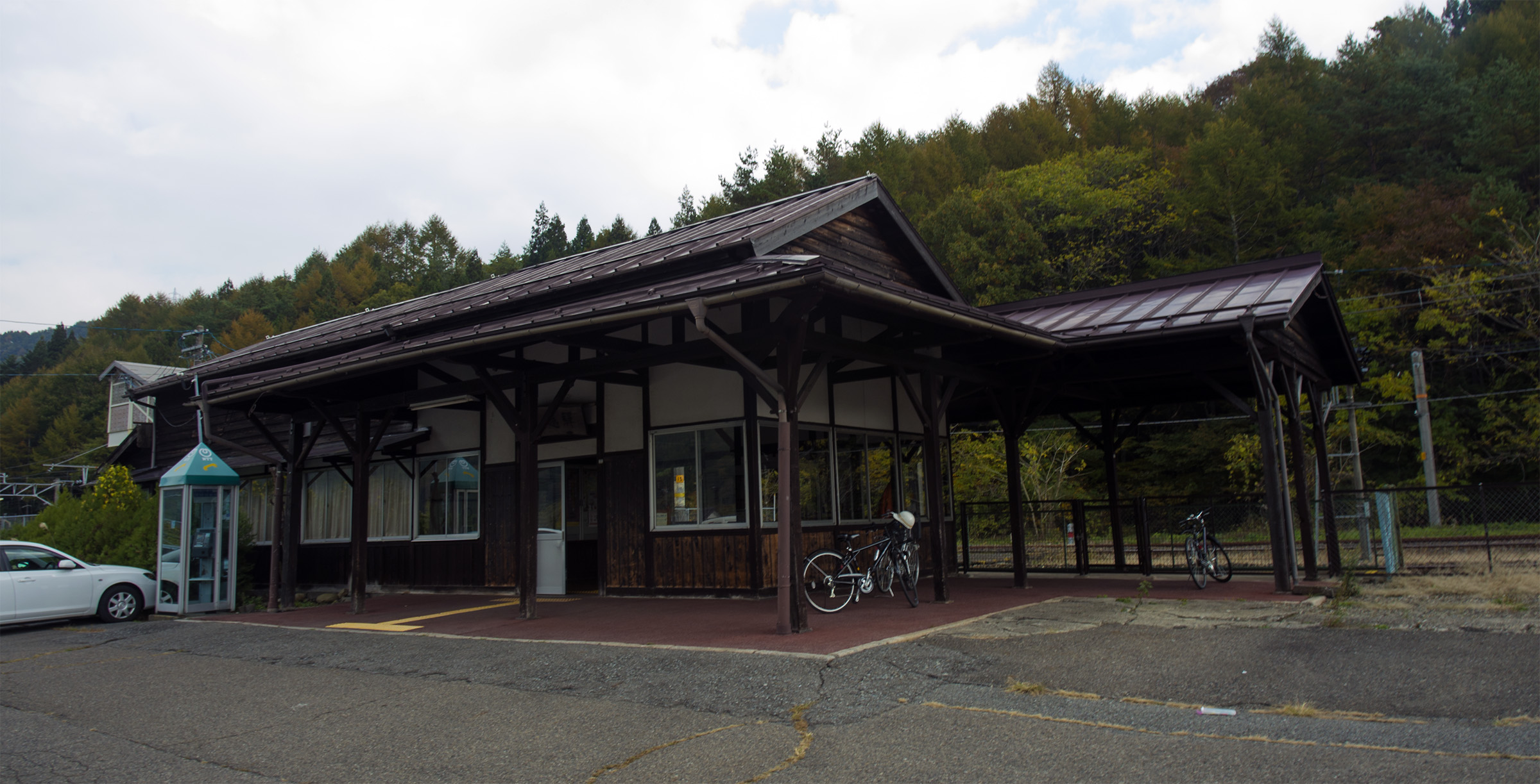 東海旅客鉄道株式会社中央本線宮ノ越駅